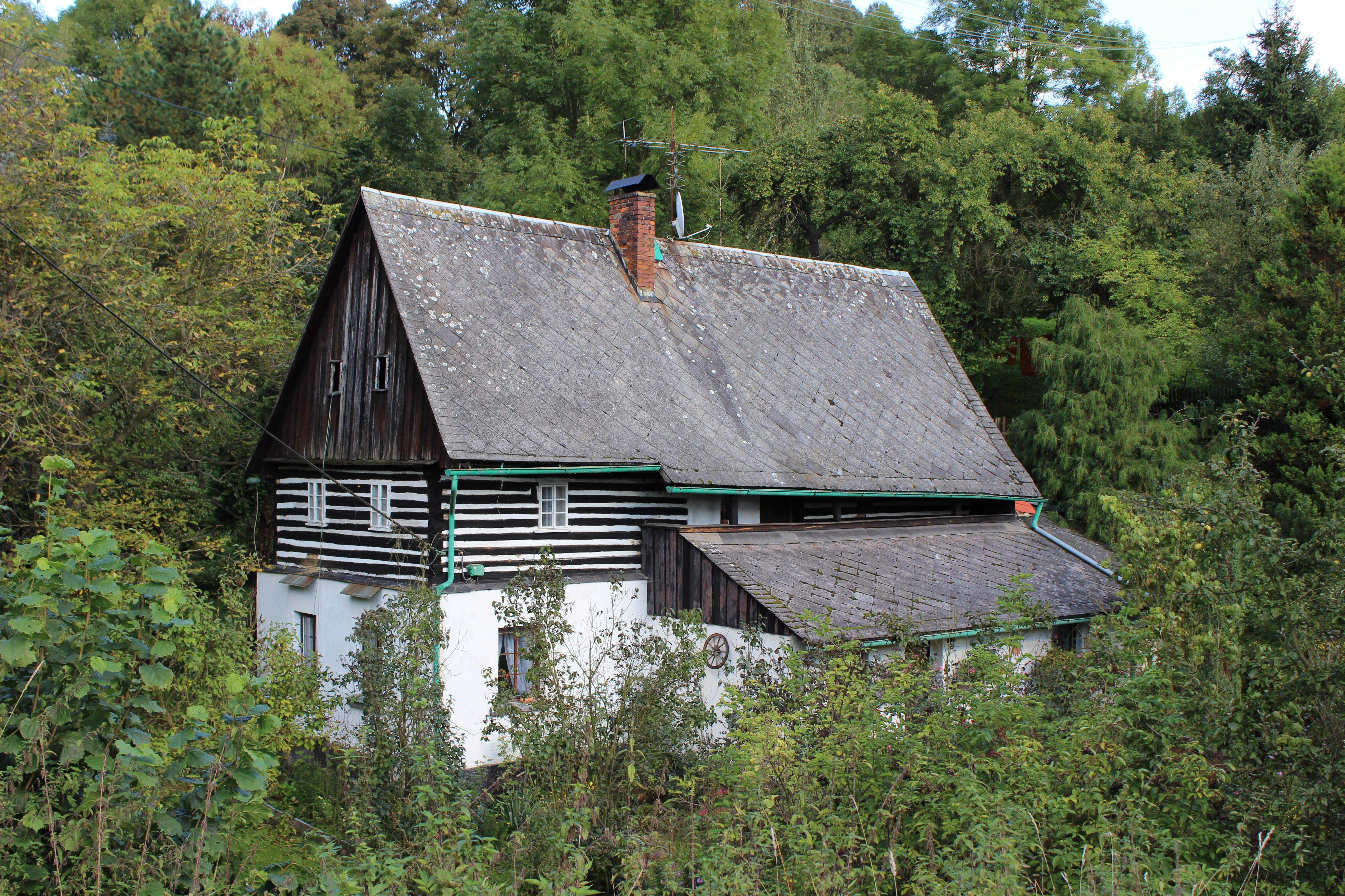 Dům číslo popisné 59 v Dobrné.